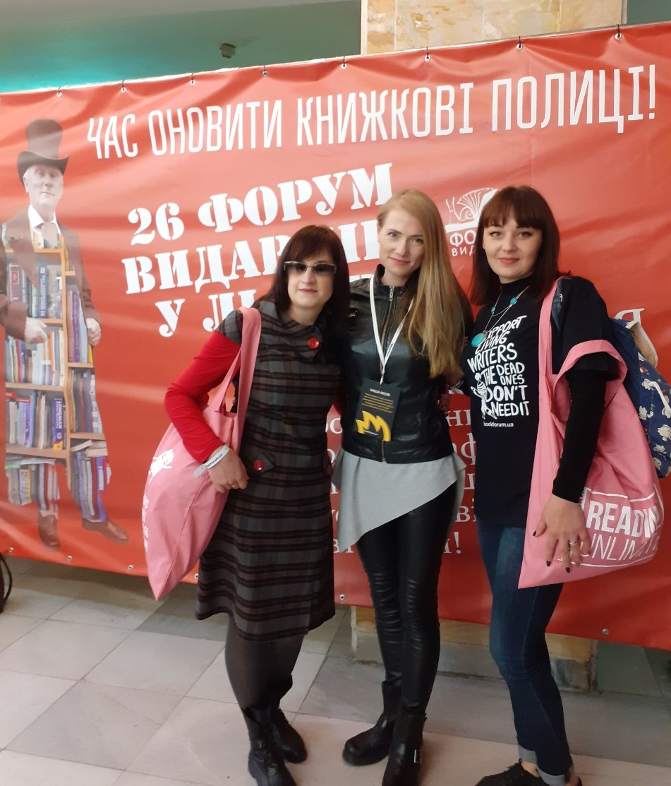 Мария Дружко на форму издателей во Львове в 2019 году